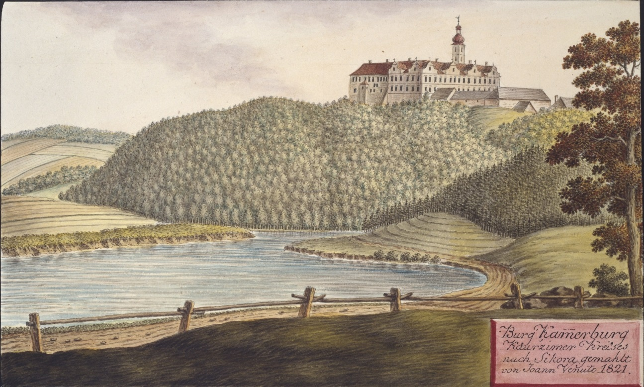 Komorní Hrádek. Burg Kammerburg Kauřzimer Kreises nach Sikora gemahlt von Joann. Venuto 1821